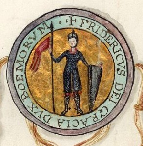 Friedrich von Böhmen